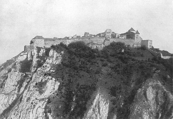 Rozsnyó vára Varjú Elemér "Magyar várak" című, 1932-ben megjelent könyvéből (1932)